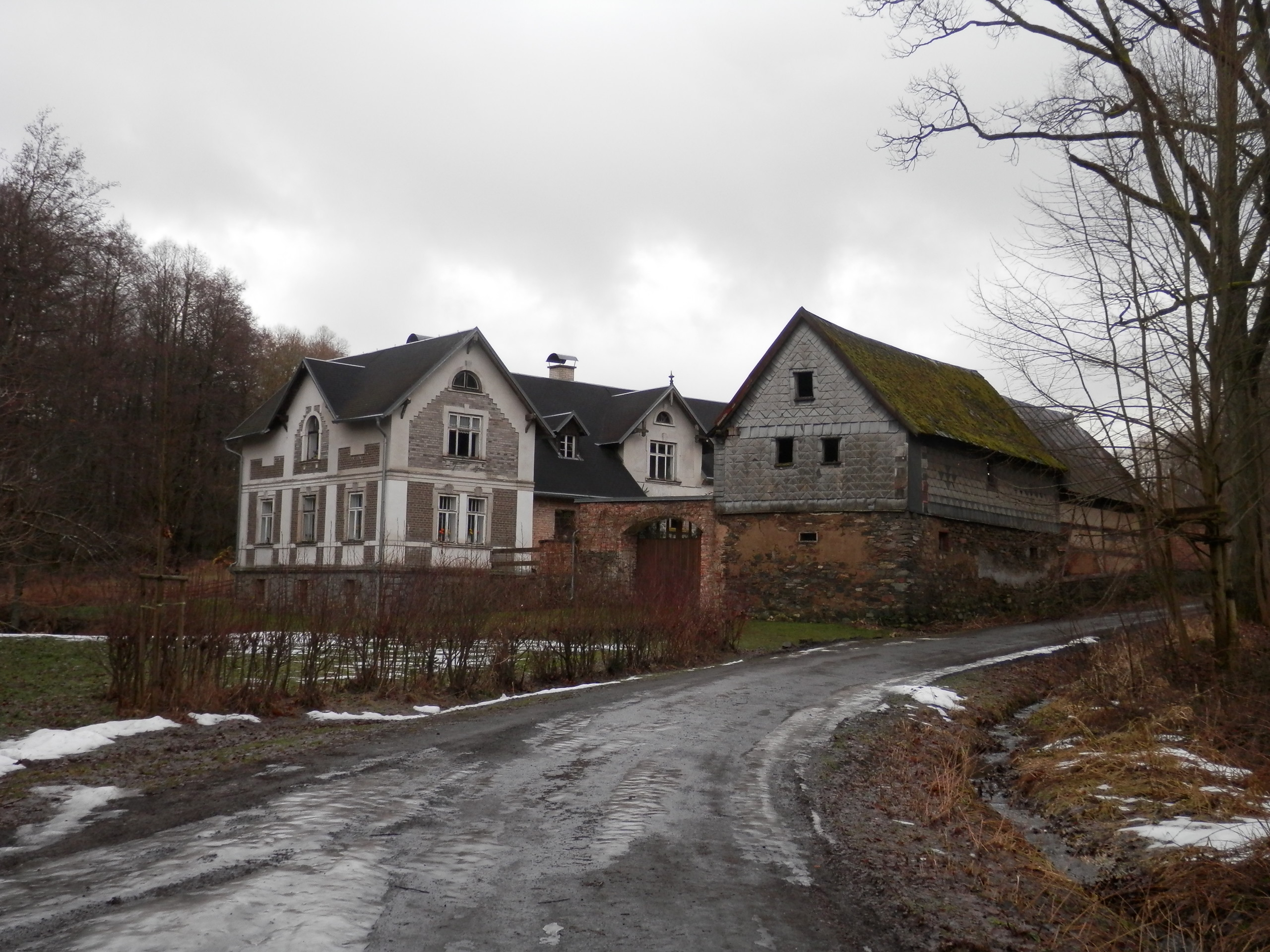 Výškovice, jediný objekt v bývalé obci